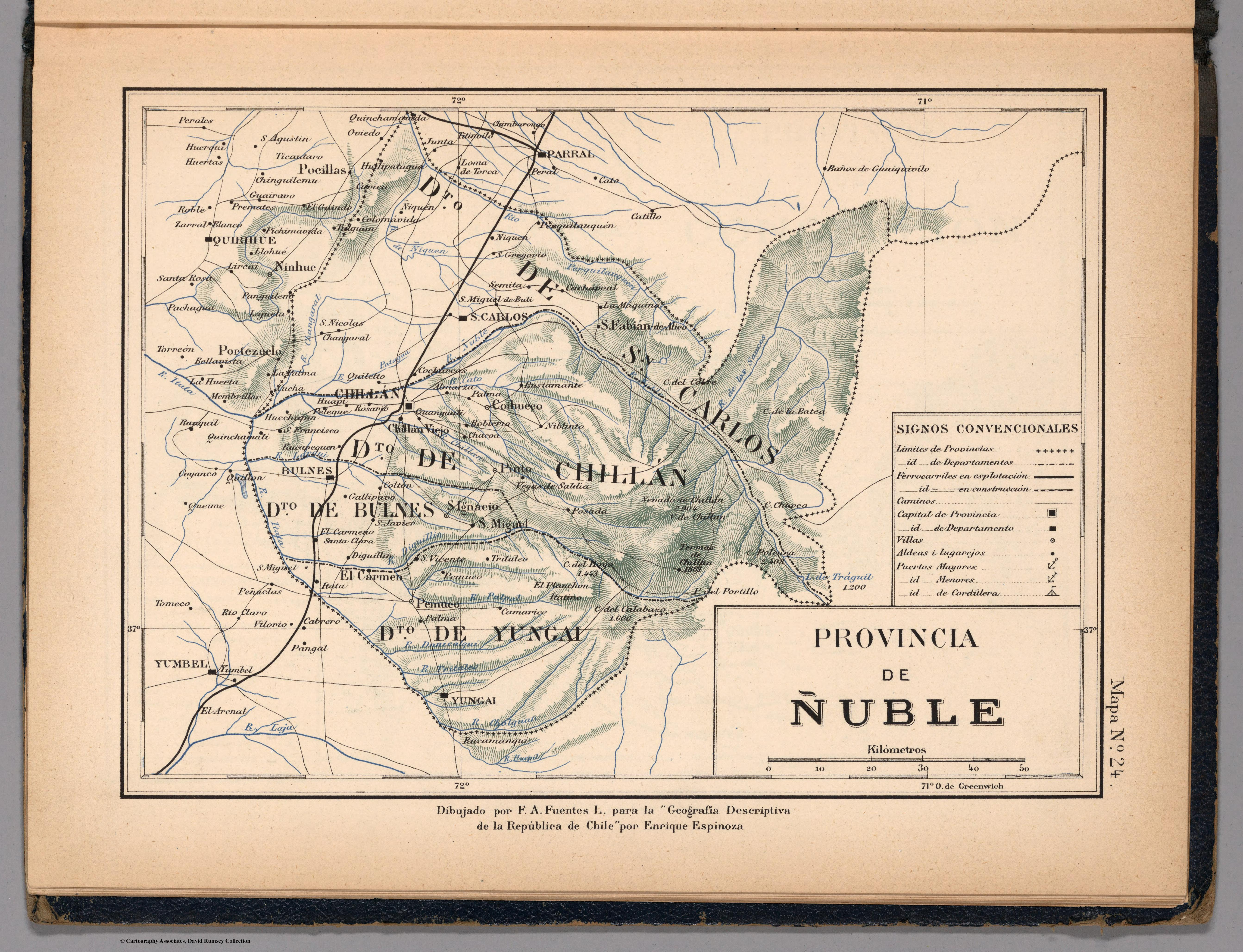 Atlas de Chile Arreglado para la Jeografia Descriptiva de la Republica de Chile por Enrique Espinoza.